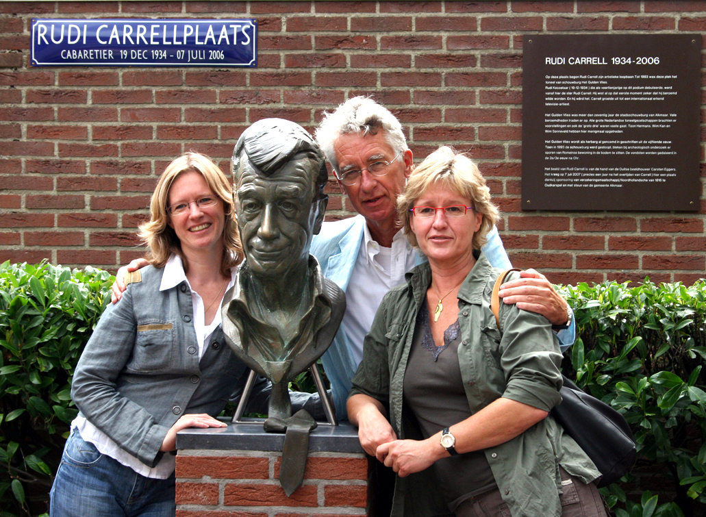 Das Rudi-Carrell-Denkmal wurde auf dem "Rudi Carrellplaats" in Alkmaar (Holland) enthüllt. Eingerahmt von den Carrell-Töchtern Caroline (l.) und Annemieke Kesselaar sowie Carrell-Bruder Aad Kesselaar